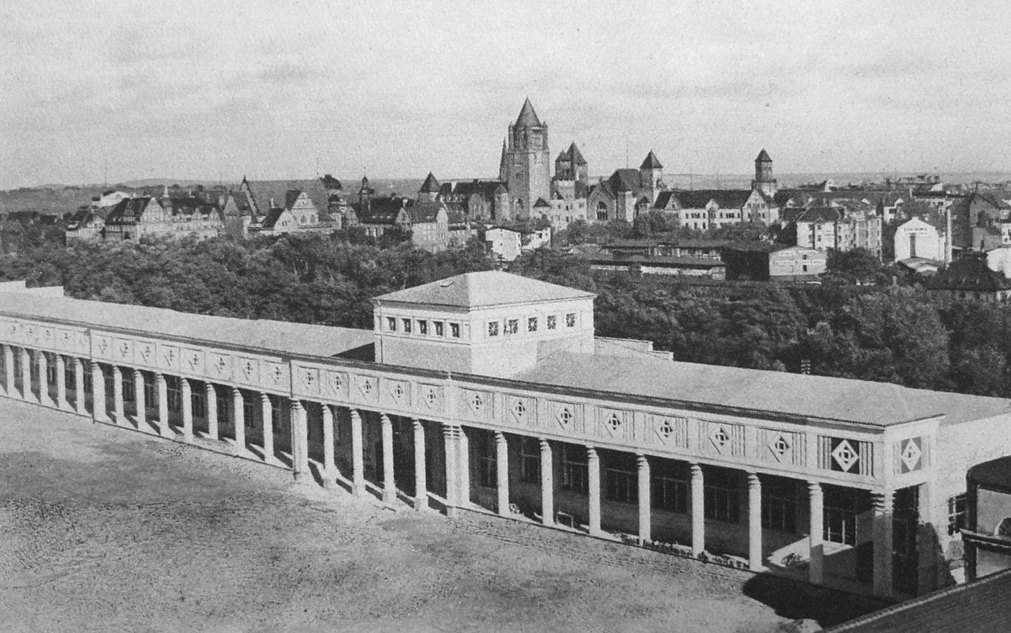 Poznań, pl. Św. Marka na terenach targowych. PWK - 1929r.